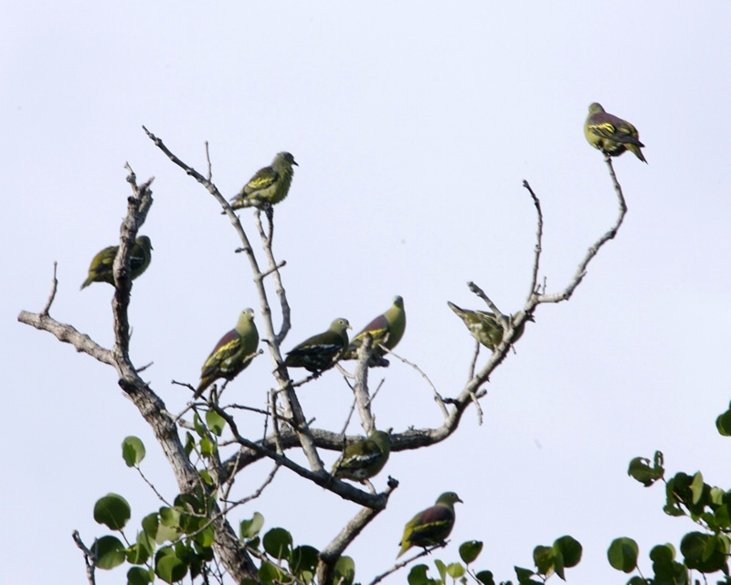 Tangkoko, Sulawesi, Indonesia 11th. July 2006